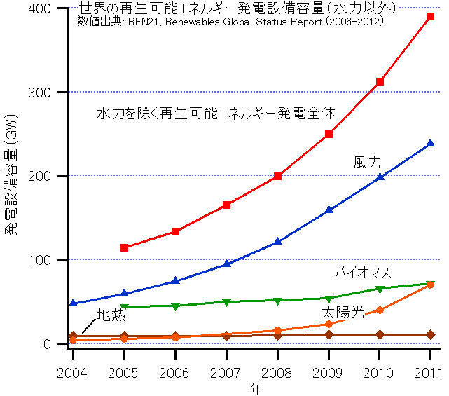 世界の再生可能エネルギーによる発電設備の容量（水力以外） 数値出典：REN21, Renewables Global Status Report (2006 - 2012)